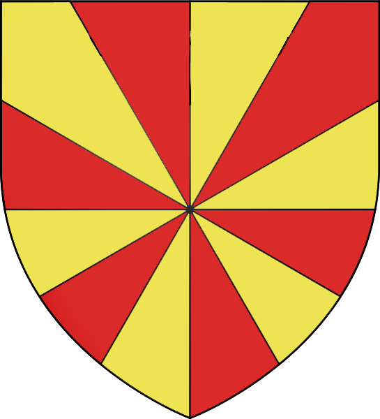 Gironné d'or et de gueules à douze pièces